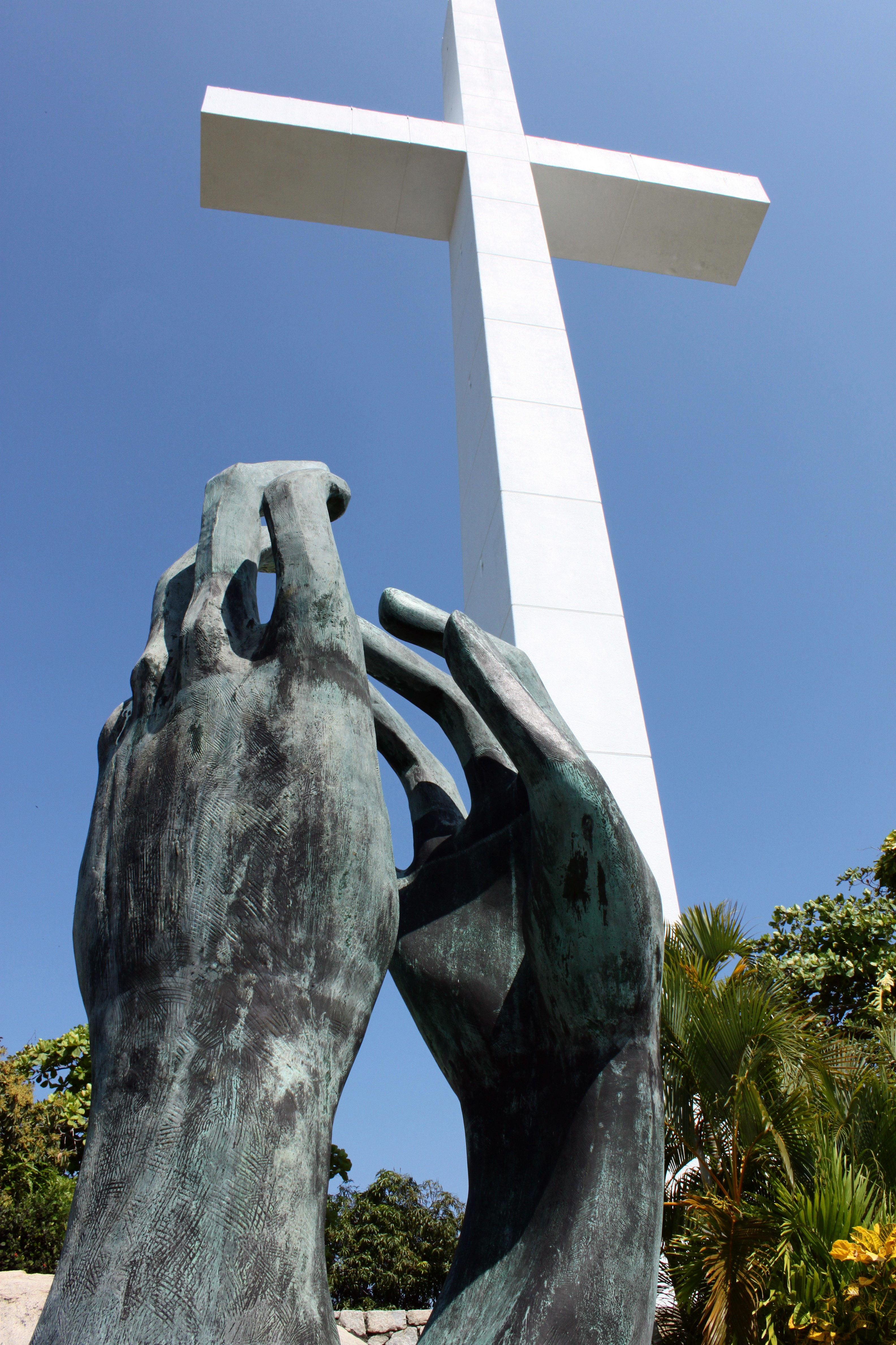 Las Manos de la Hermandad y Cruz de la Capilla Ecuménica La Paz en Acapulco, Guerrero, México.